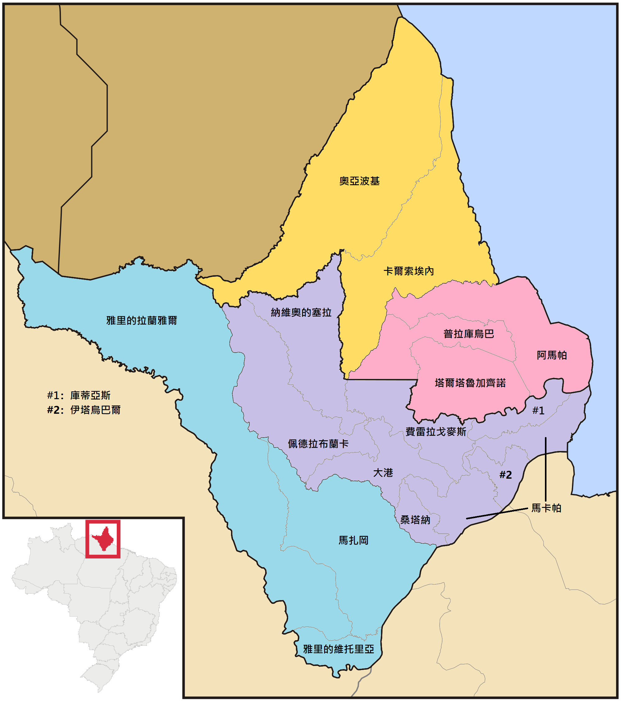 中文（香港）: 阿馬帕州市鎮列表。